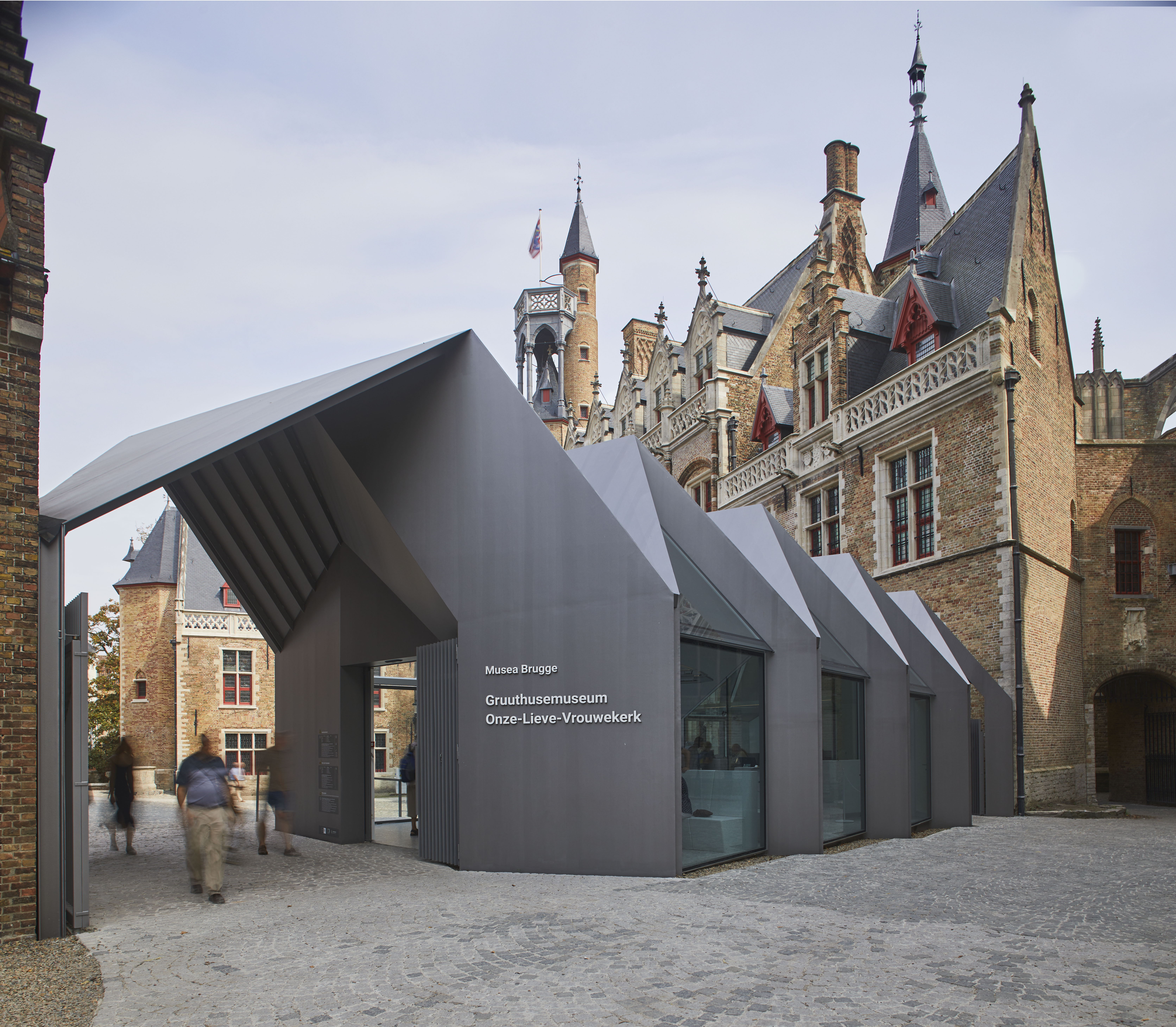 Gruuthusemuseum